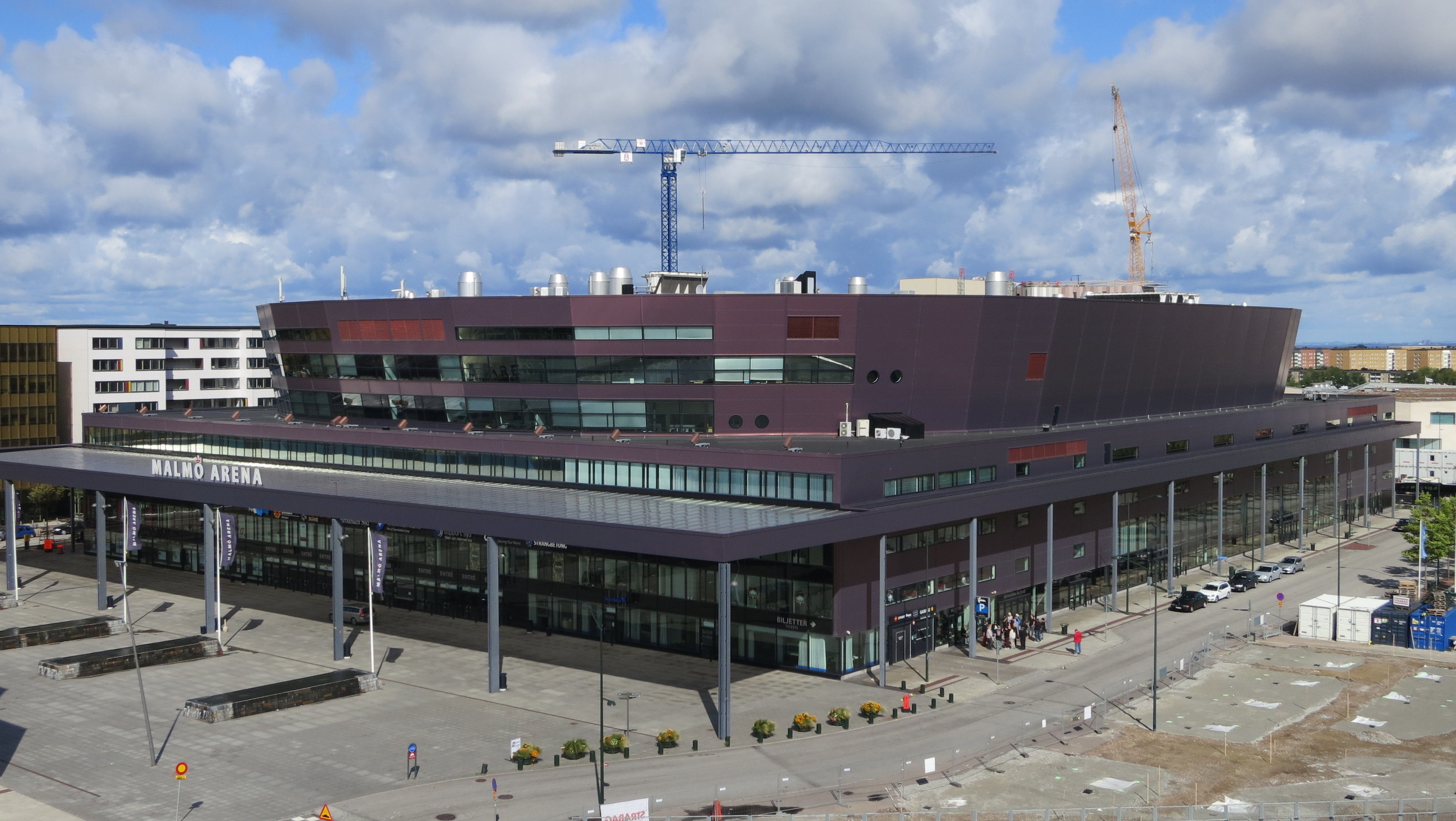 Malmö Arena i augusti 2014